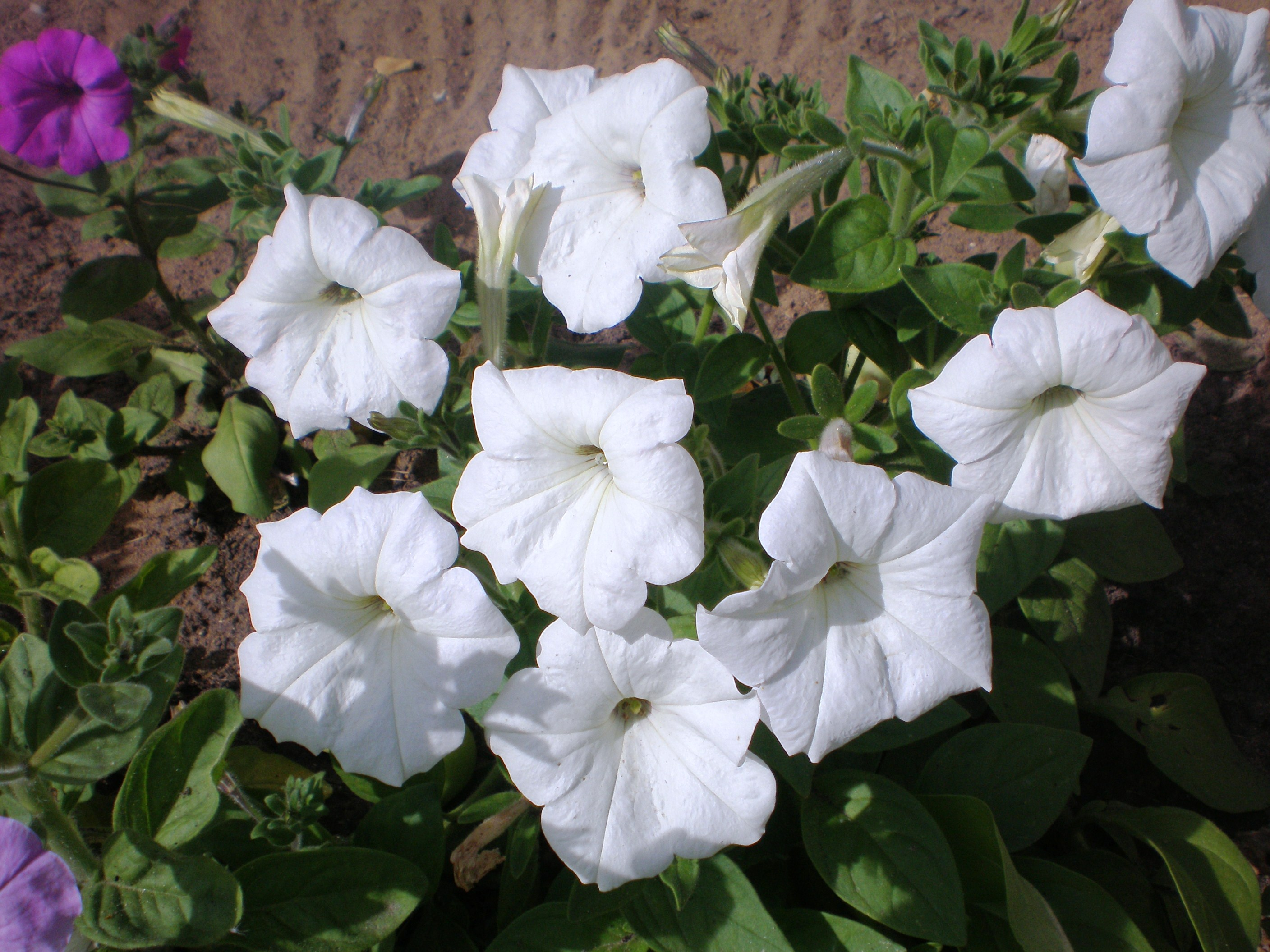 Petunia